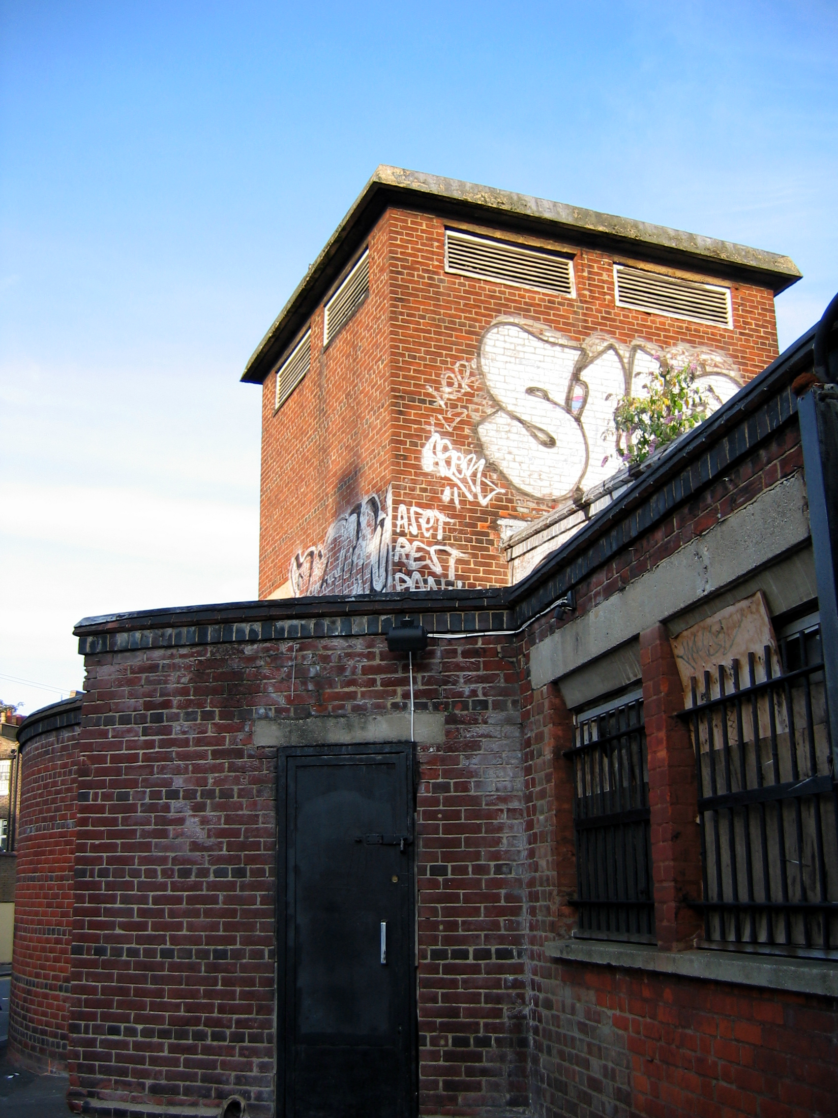 Camden Town deep level shelter. Taken by C Ford, Summer 2004.